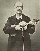 Karel Waeri (1842-1898), Gentse Volkszanger - Gent - Oost-Vlaanderen - België